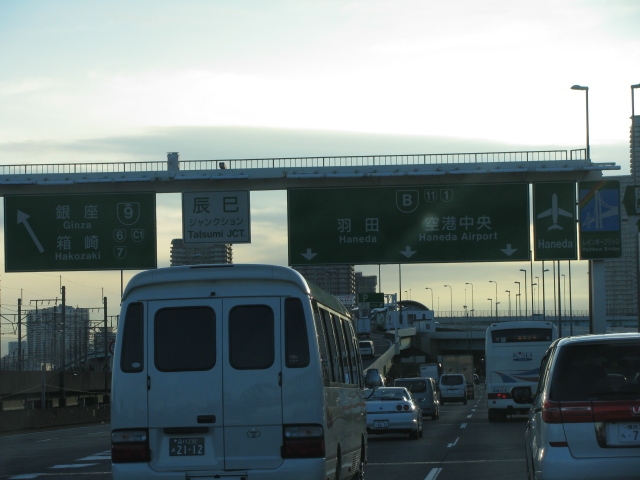 2009年8月11日、辰巳JCT付近で湾岸線浦安方面より撮影